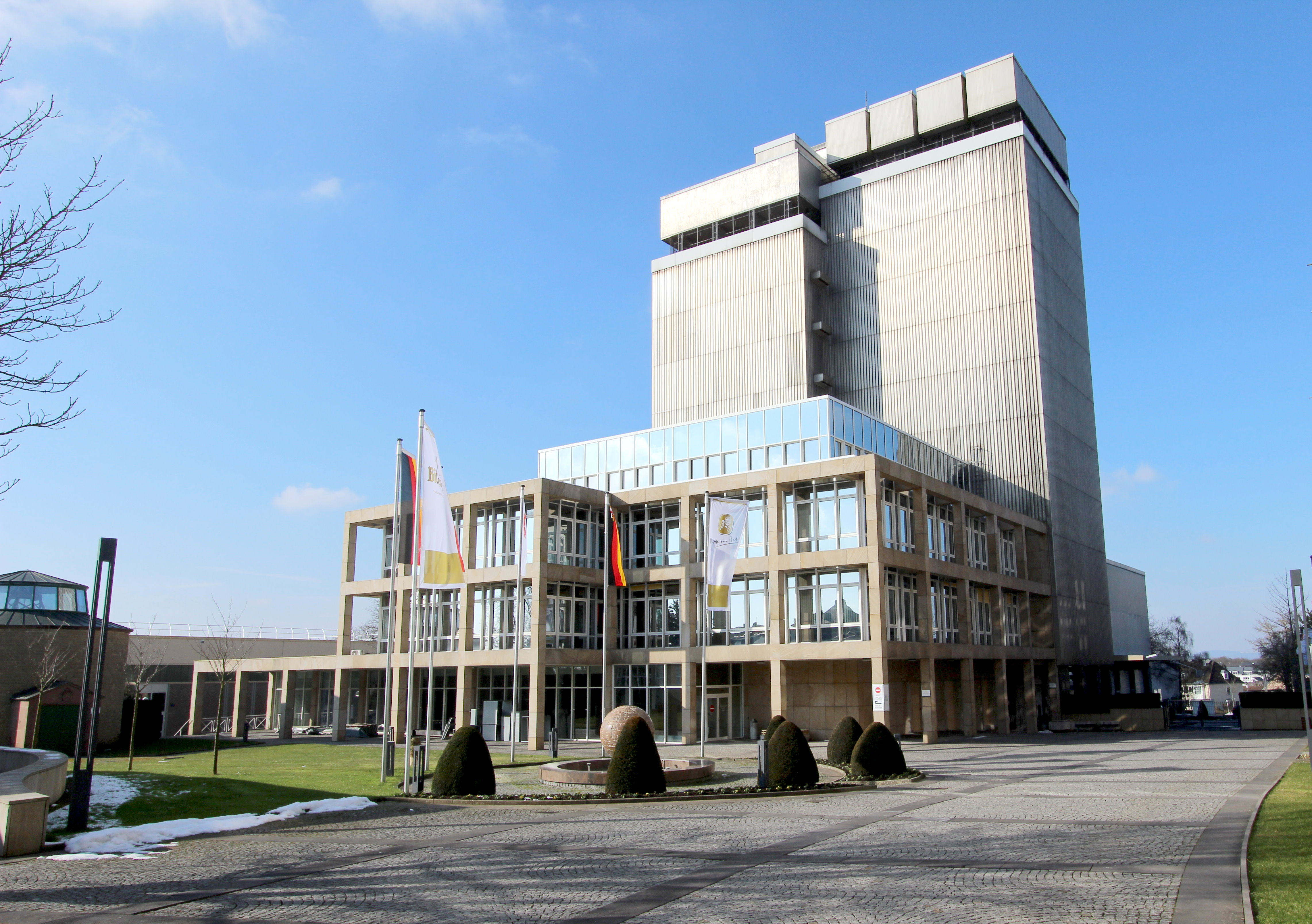 54634 Bitburg, Römermauer 3. Bis heute ist das historische Sudhaus mit den kupfernen Braukesseln zu sehent. Hier wurde 2009 eine Bitburger „Marken-Erlebniswelt“ errichtet: Besucher erfahren hier in Führungen auf über 1.500 Quadratmetern Fläche alles über die Geschichte der Brauerei. Aufnahme von 2018.